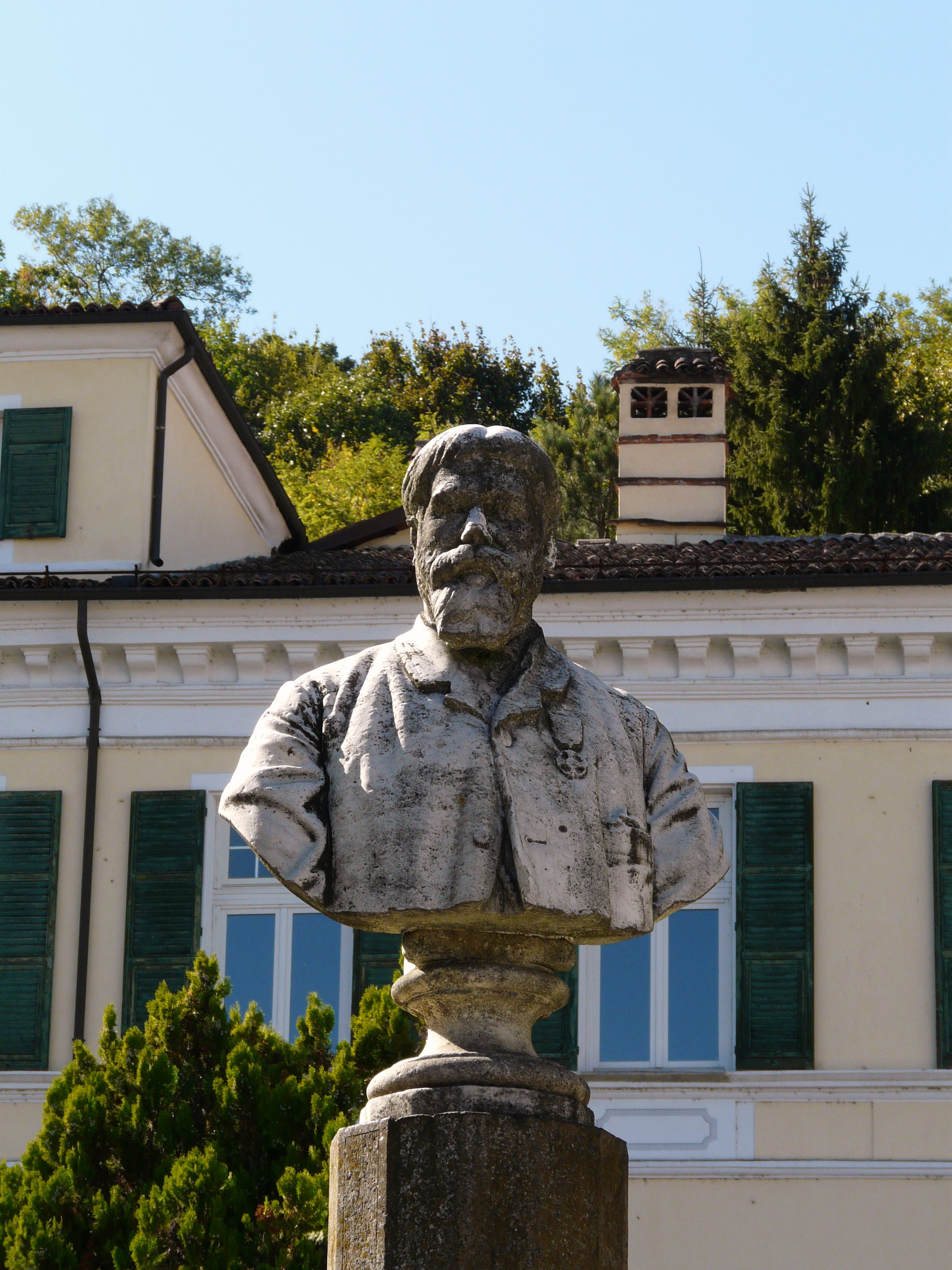 Busto del pittore Santo Bertelli, Arquata Scrivia, Piemonte, Italy